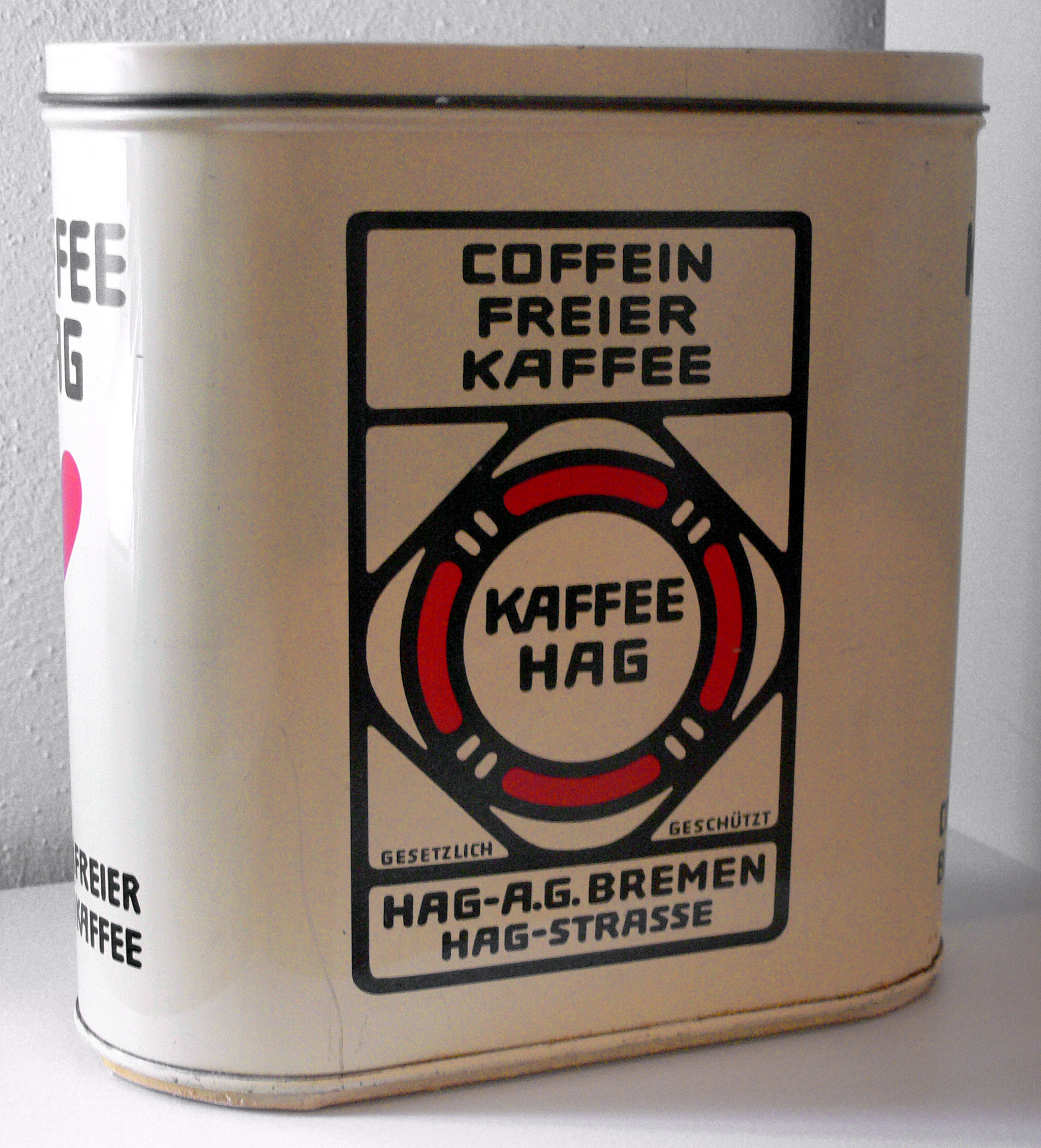 Kaffe-Hag-Dose Landesmuseum Württemberg (Außenstelle Museum für Volkskultur in Württemberg, Waldenbuch)